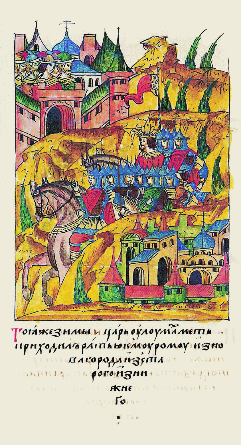 В ту же зиму царь Улу-Мах- мет приходил с войском к Мурому из Старого Нижнего Новгорода